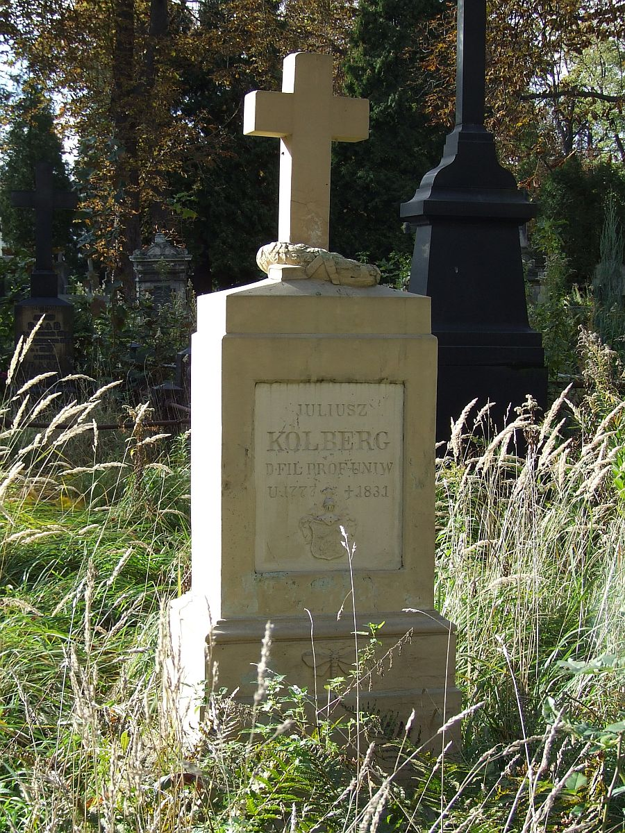 Juliusz Kolberg tomb, Cmentarz Ewangelicko-Augsburski w Warszawie